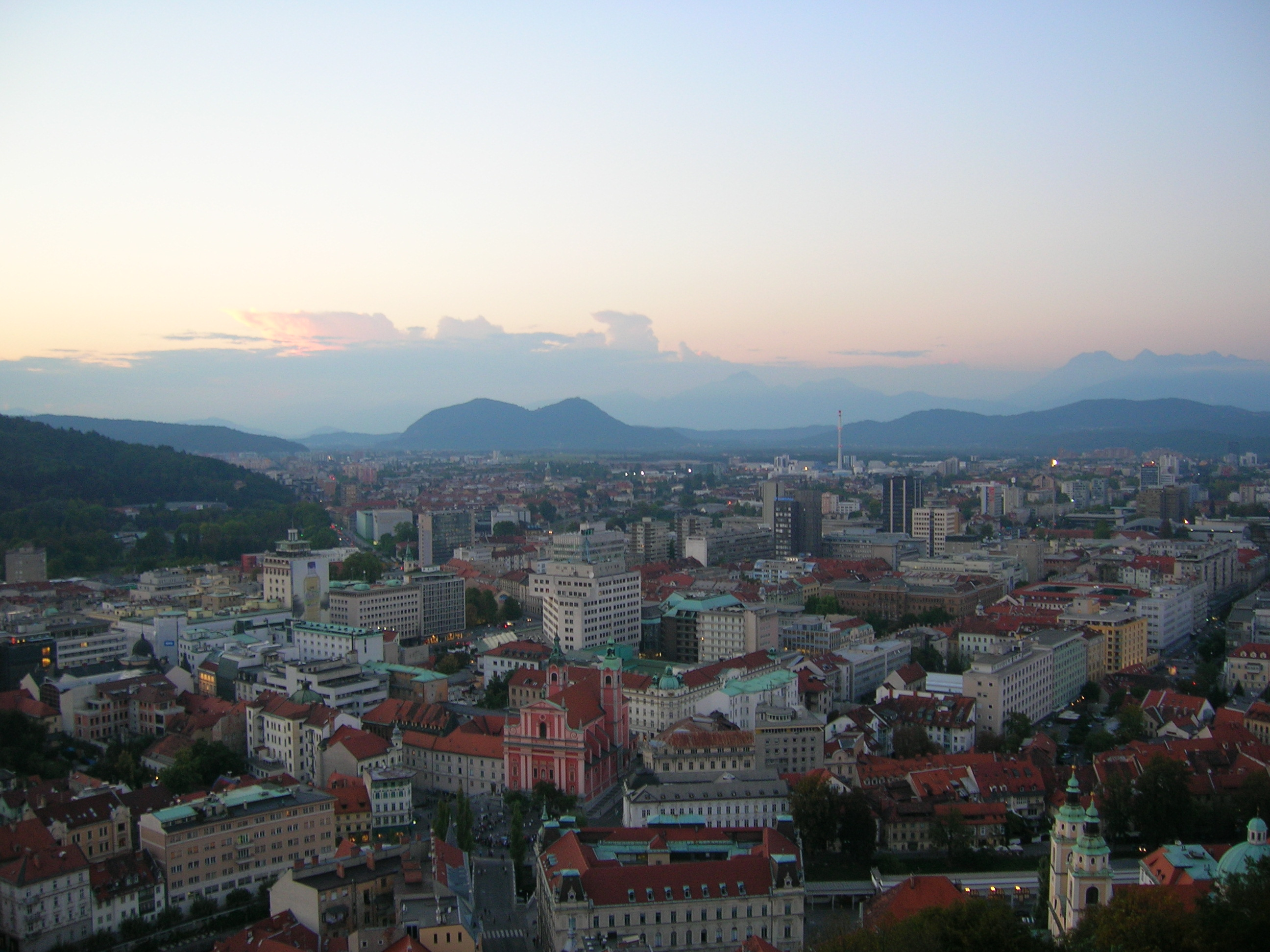 Ljubljana, a view from Ljubljana Castle.